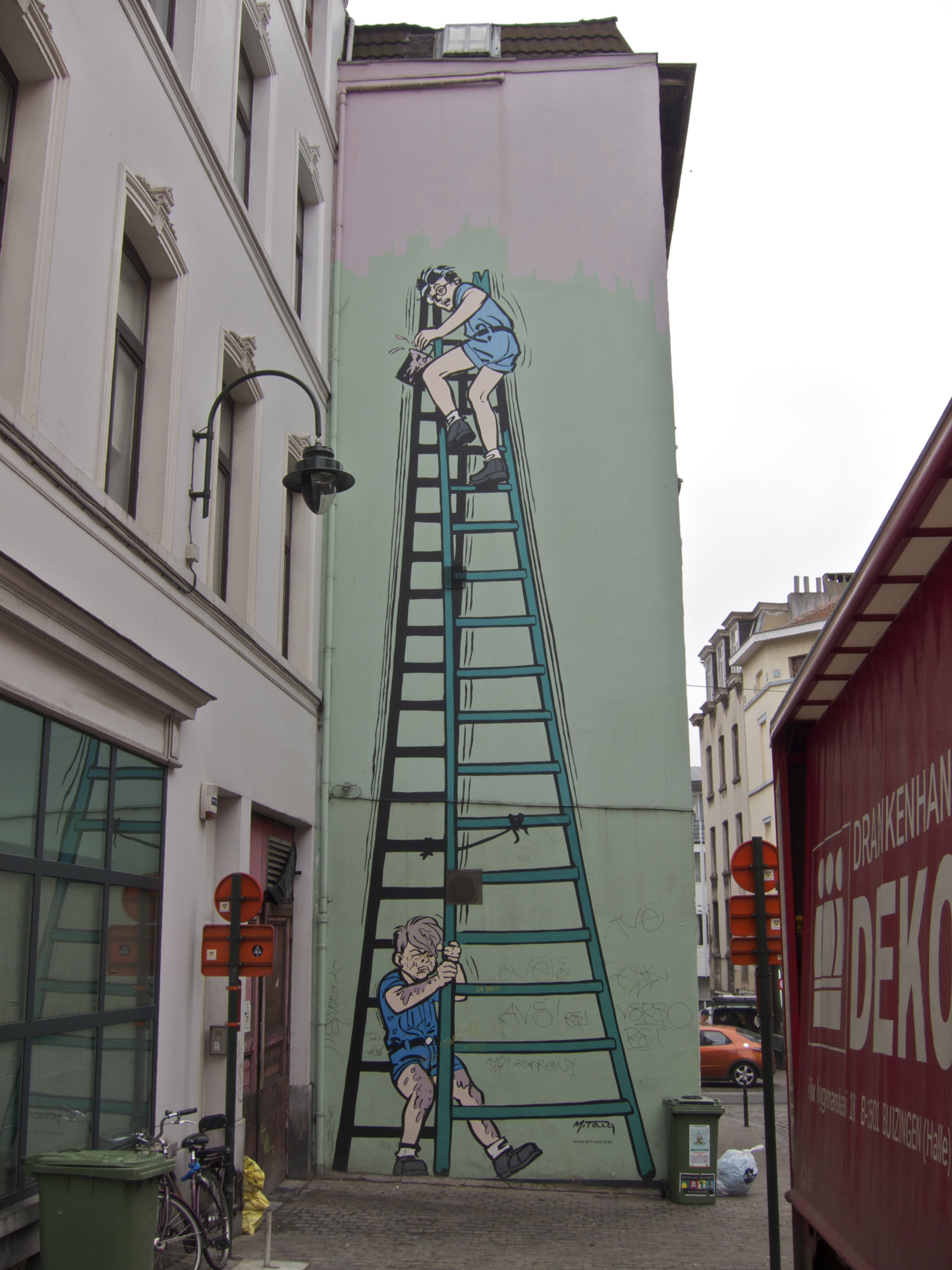 Stipmuur de Beverpatroelje te Brussel